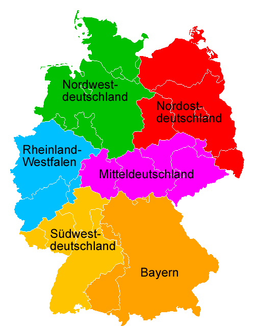 Vorschlag zur Neugliederung der Bundesrepublik Deutschland - Sechs-Länder-Lösung